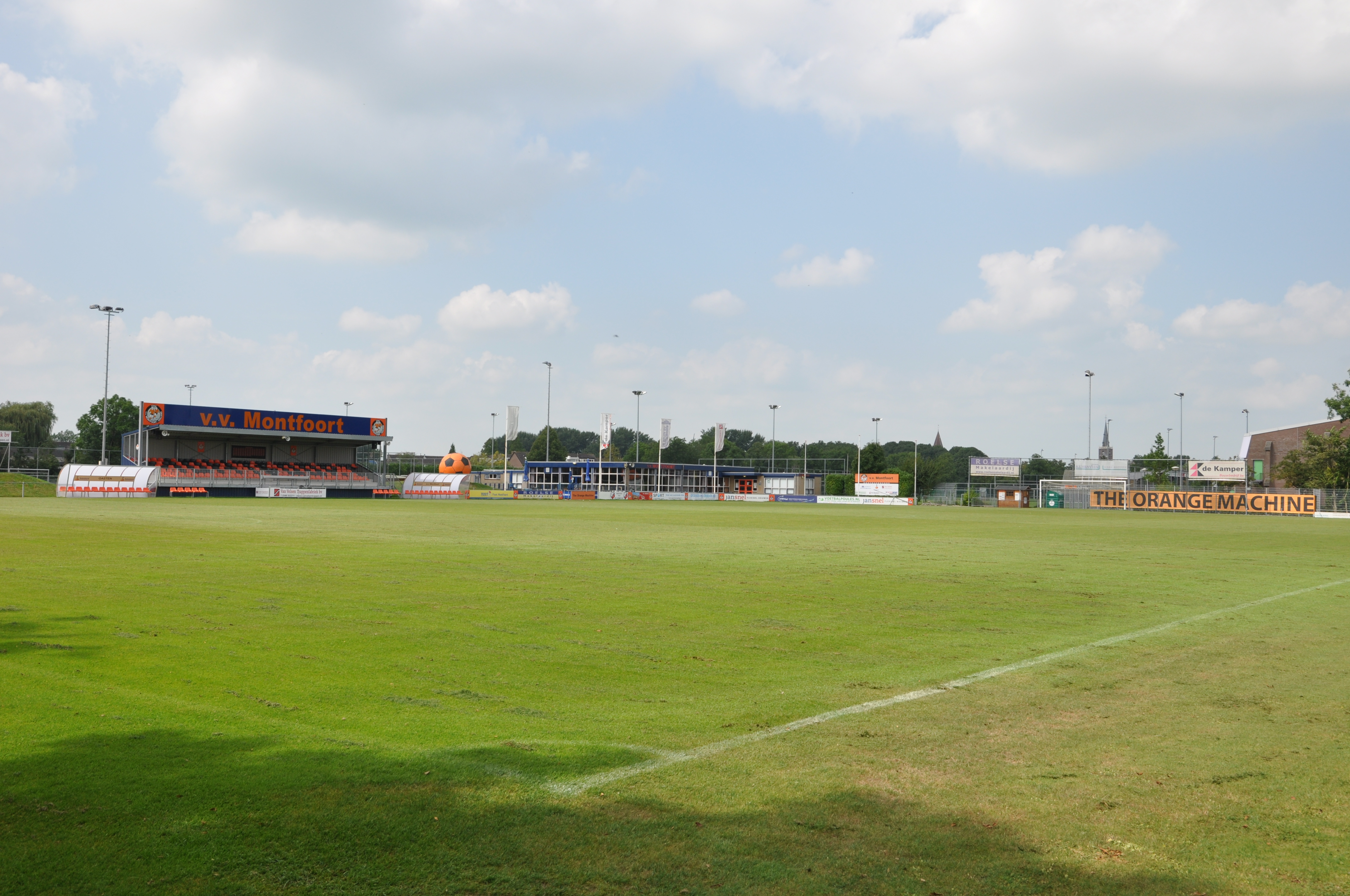 VV Montfoort.